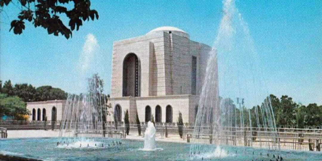 Mausolée de Reza Chah à Ray (1950-1979)